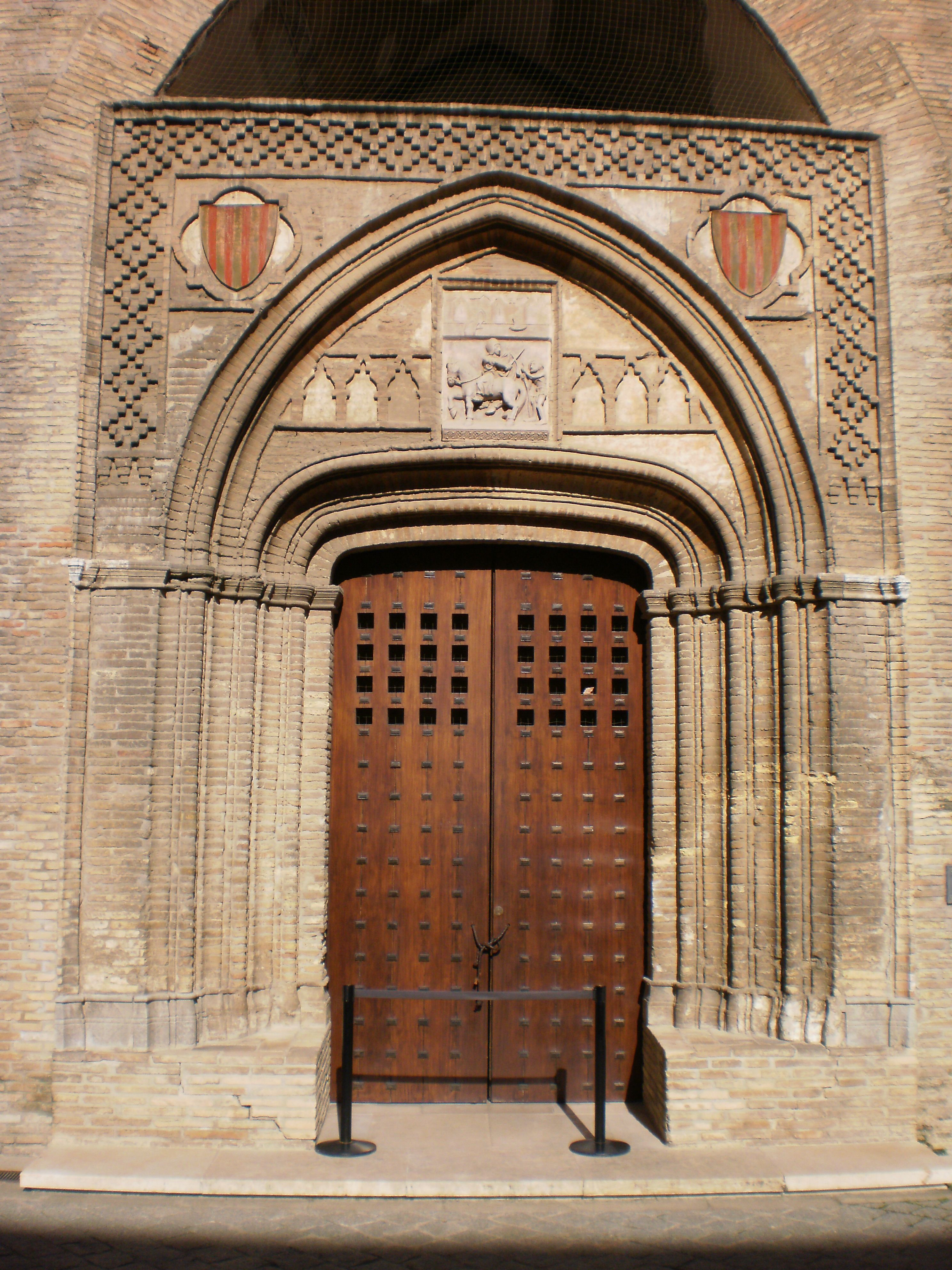 La Aljafería, Zaragoza